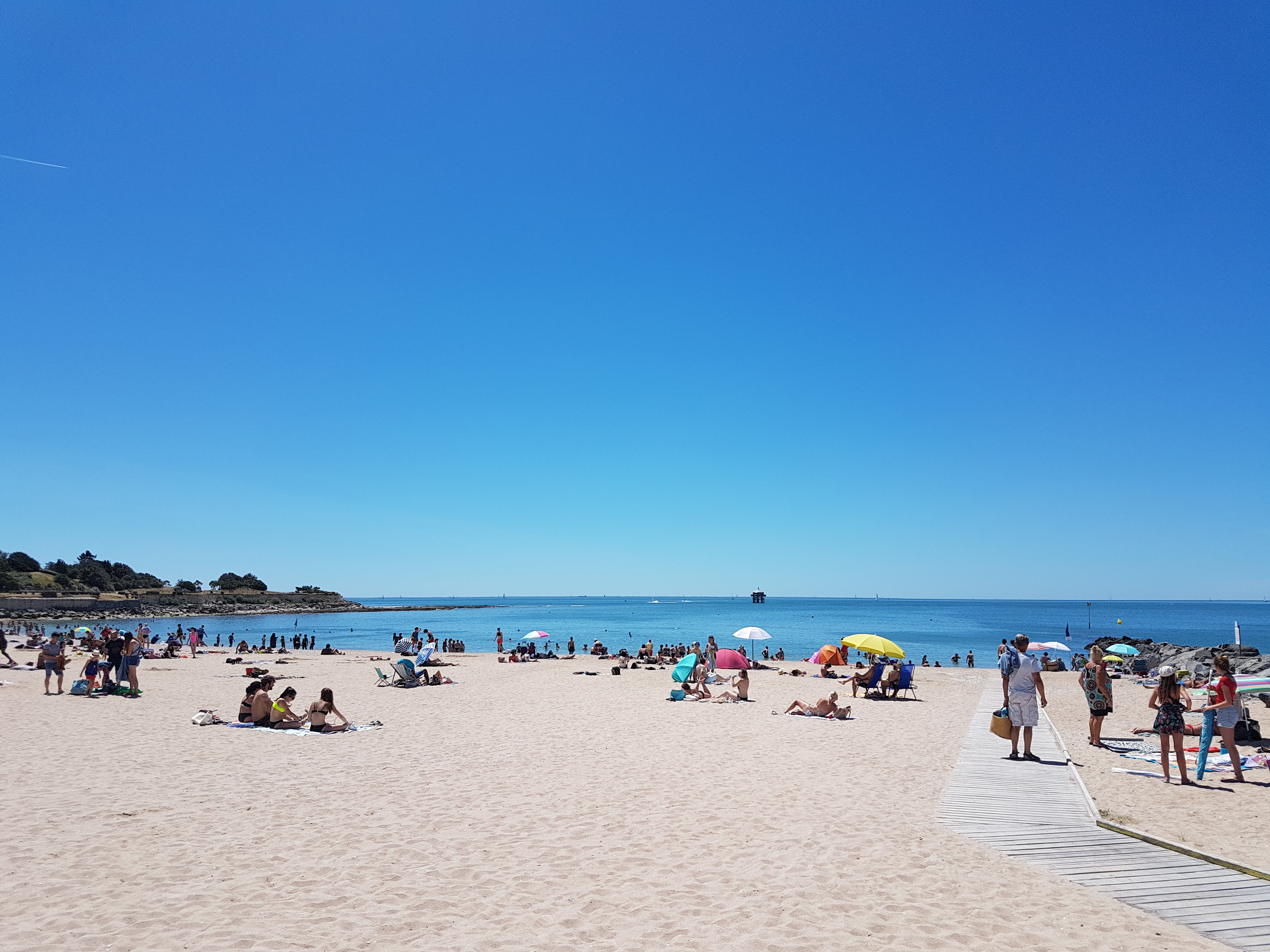 Balades le long de la côte, vue sur le large le, sur les îles de Ré et d'Oléron